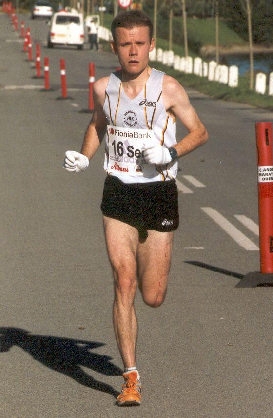 Jeppe Farsøht ved HC Andersen maraton i 2004